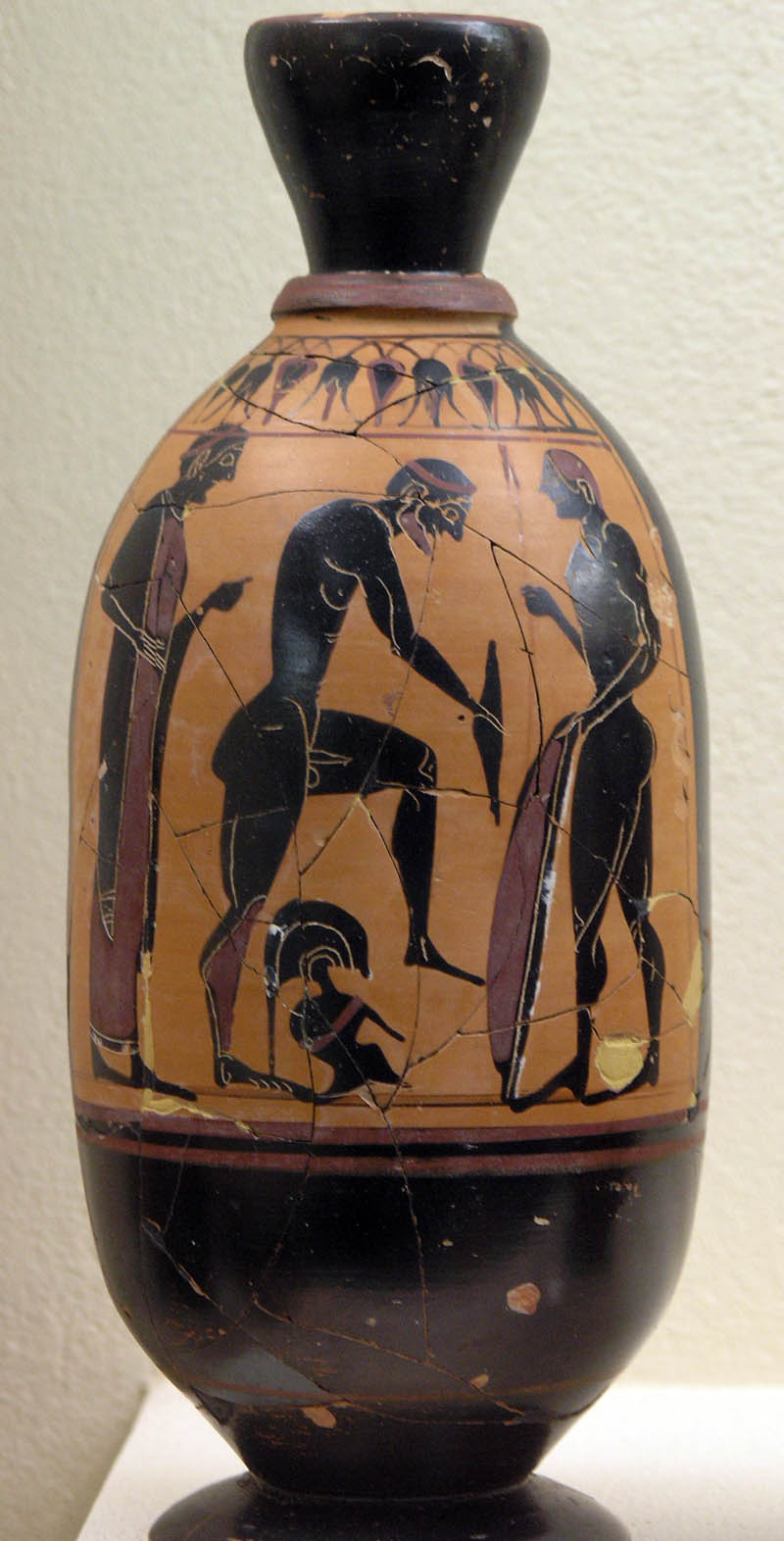 Lékythos représentant un guerrier en train de s'armer. Vers 550 a. C. Musée archéologique du Céramique, n° T 5B/VII.